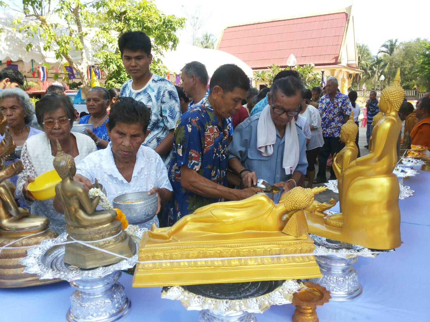 วัฒนธรรมประเพณีไทย